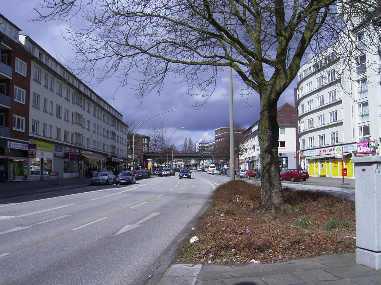 Fuhlsbütteler Straße in Hamburg-Barmbek-Nord (stadtauswärts)